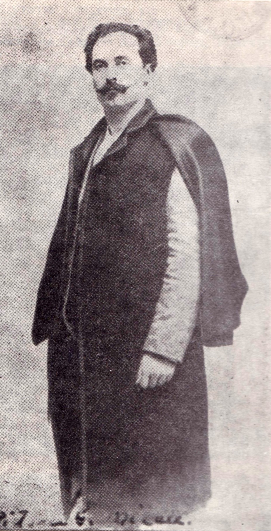 George Demetrescu Mirea